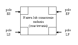 Blok_zadania_dla_sciezki_krytycznej.PNG